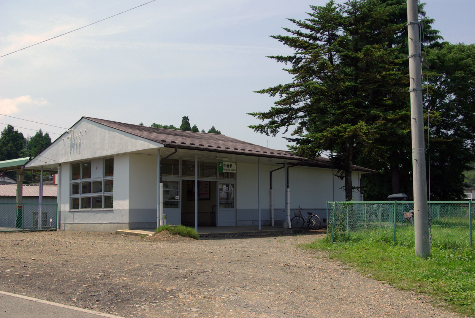 JR気仙沼線松岩駅